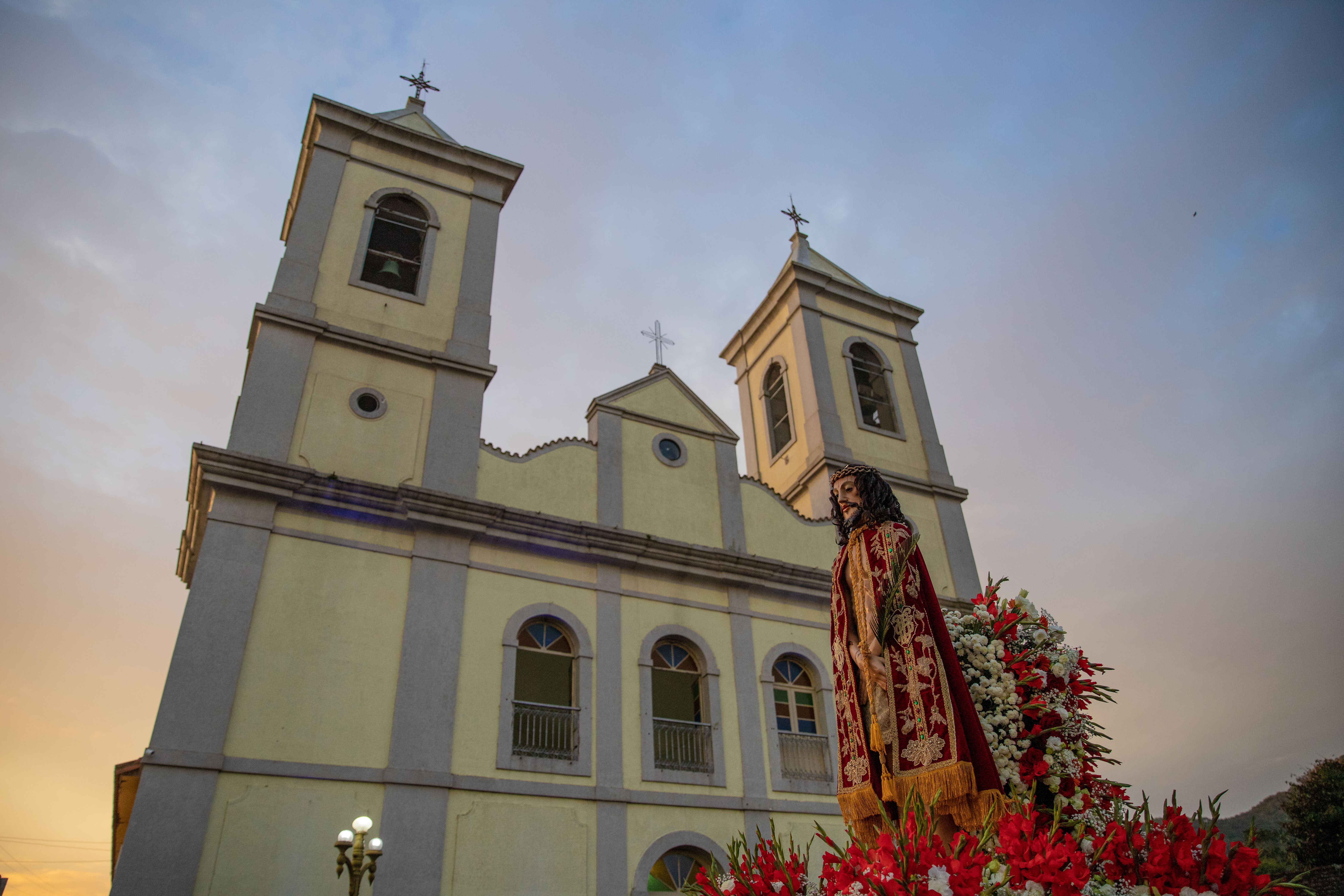 O governador Márcio França, participa da Procissão do Senhor Bom Jesus de Iguape, cujo tema deste ano é “Caminhando com o Bom Jesus, Descubramos o Rosto da Igreja” . Local: Iguape/SP Data: 07/08/2018. Foto: Governo do Estado de São Paulo